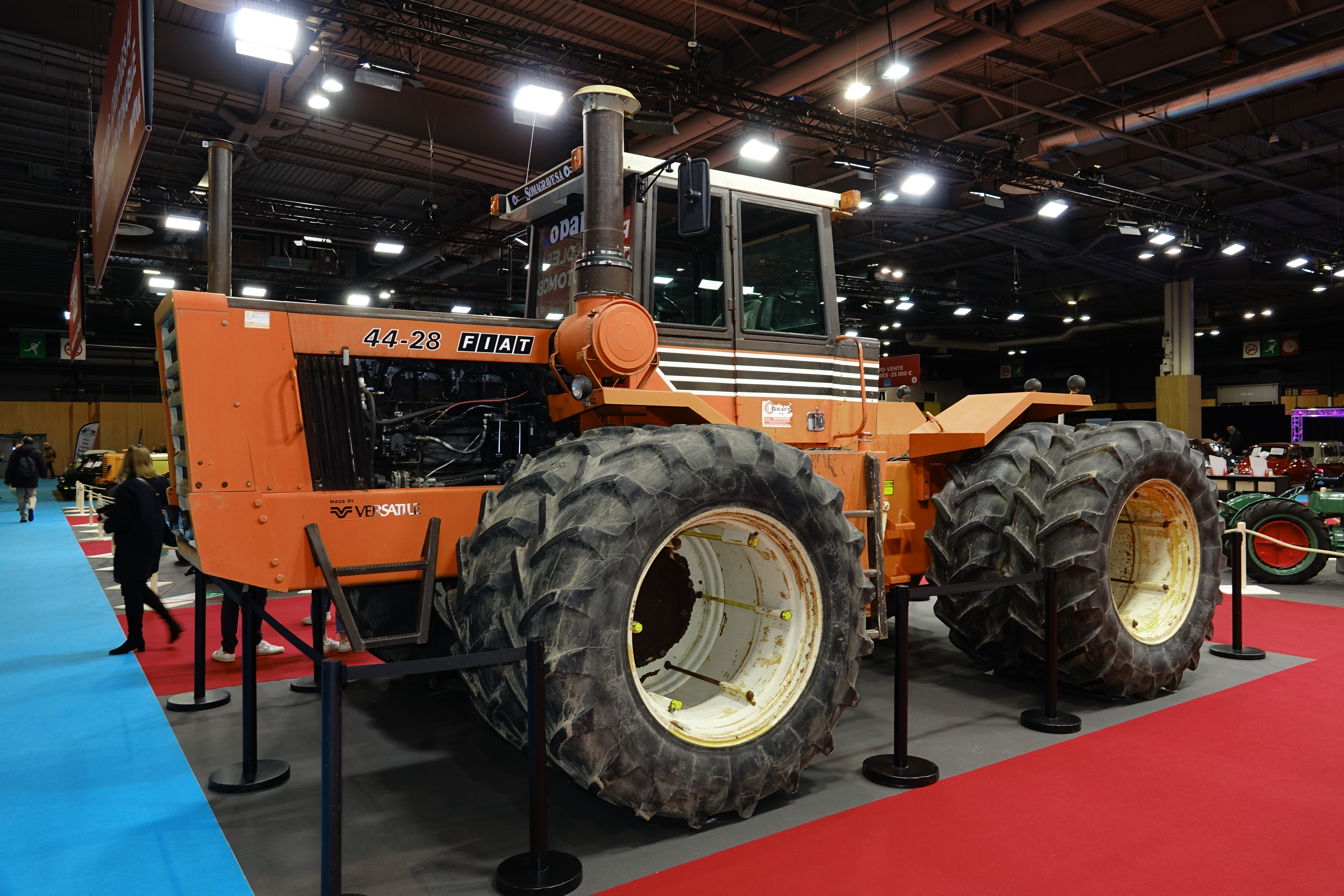 Exposition de tracteurs au salon Rétromobile 2020